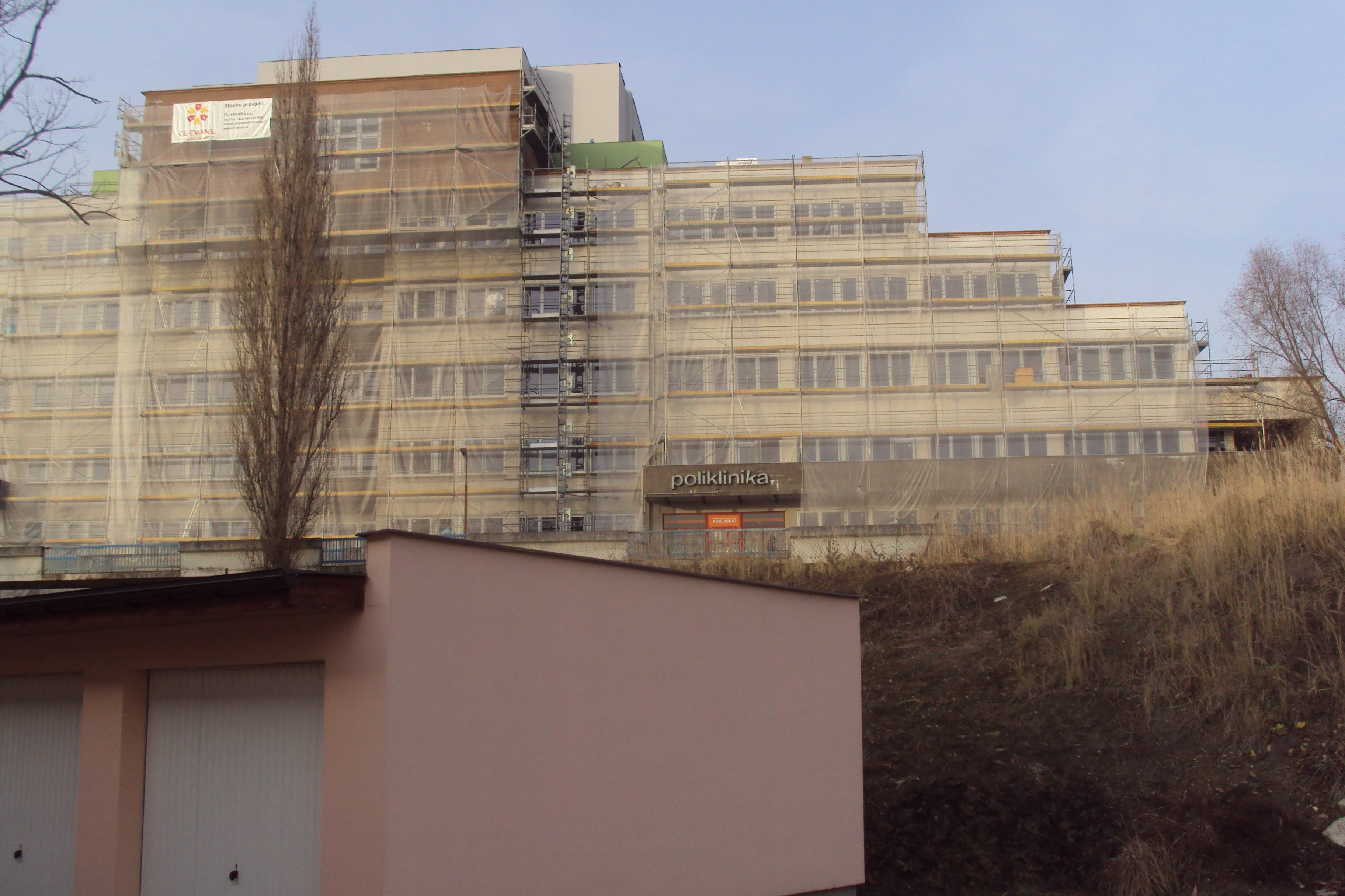 Zateplování objektů českolipské nemocnice